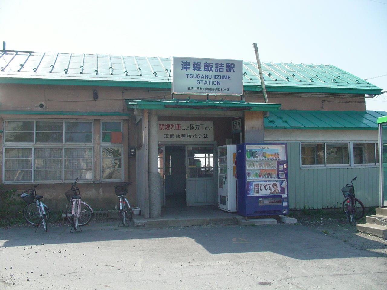 （津軽鉄道線津軽飯詰駅）